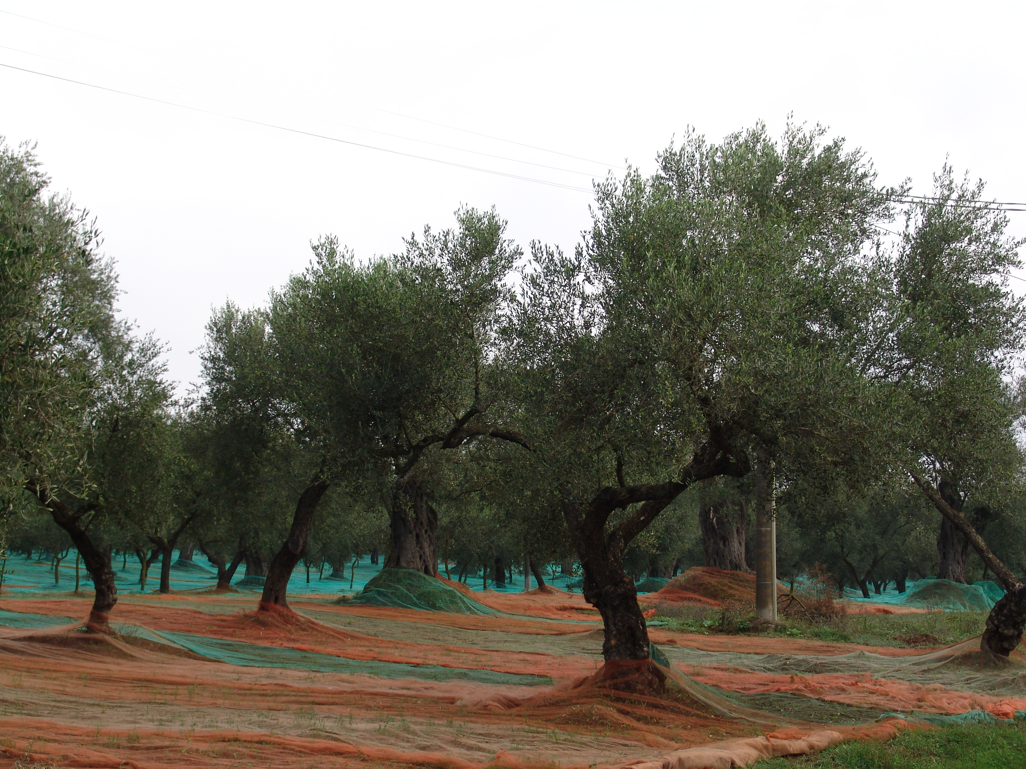 Olivenhain.